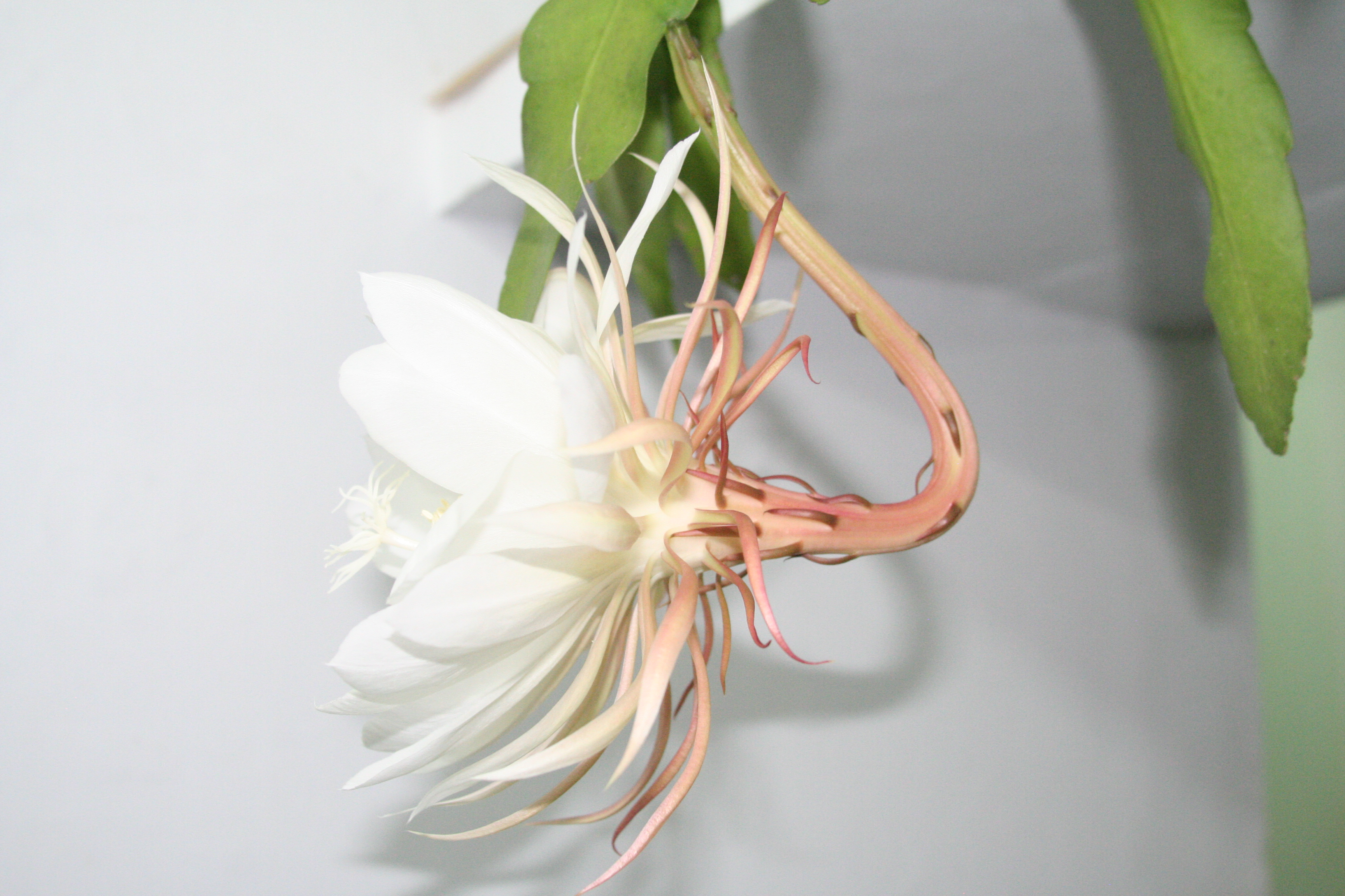 Epiphyllum oxypetalum